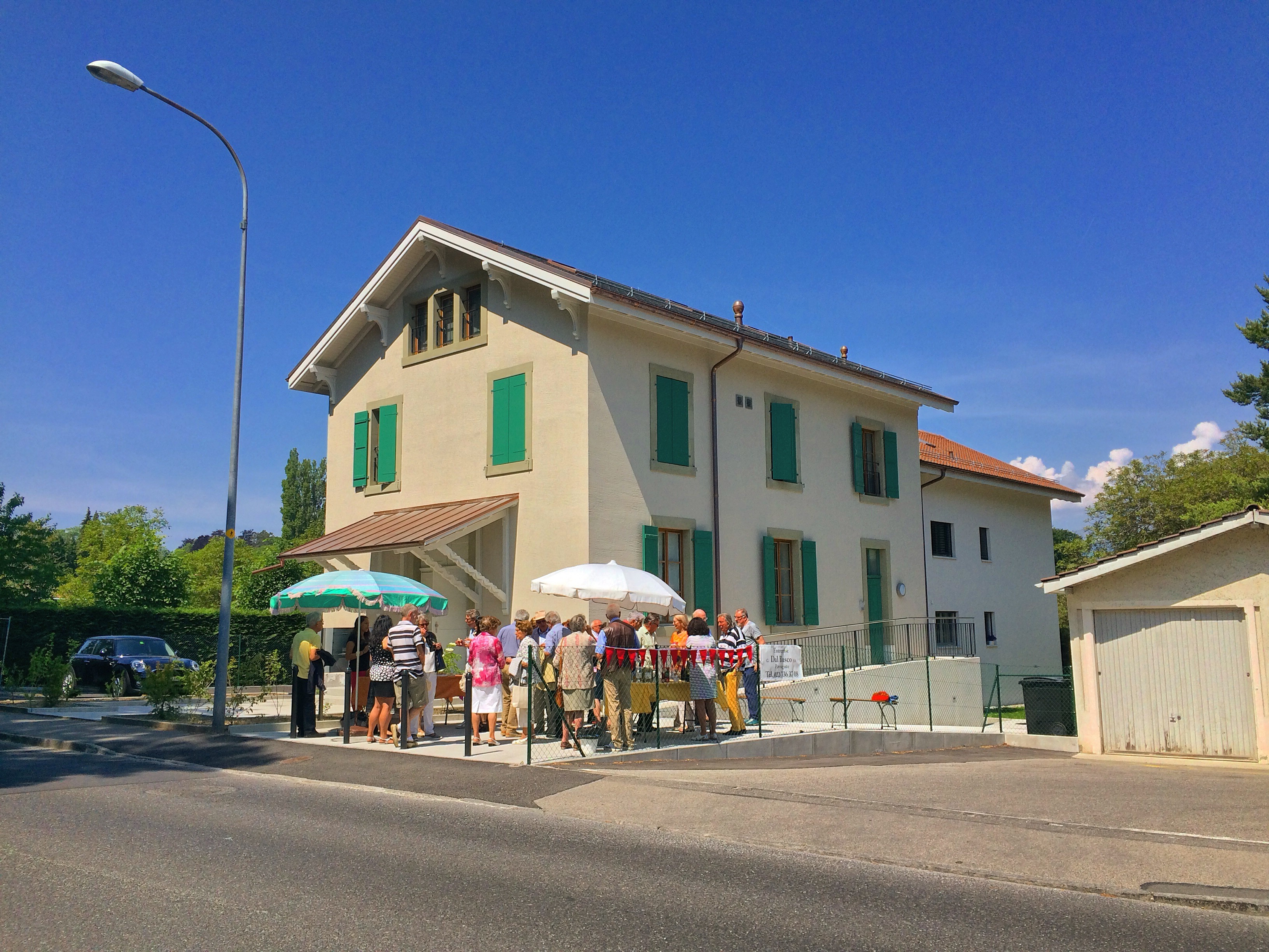 Verrée à la cure catholique romaine de Pregny-Chambésy, lors de la fête de Sainte-Pétronille.